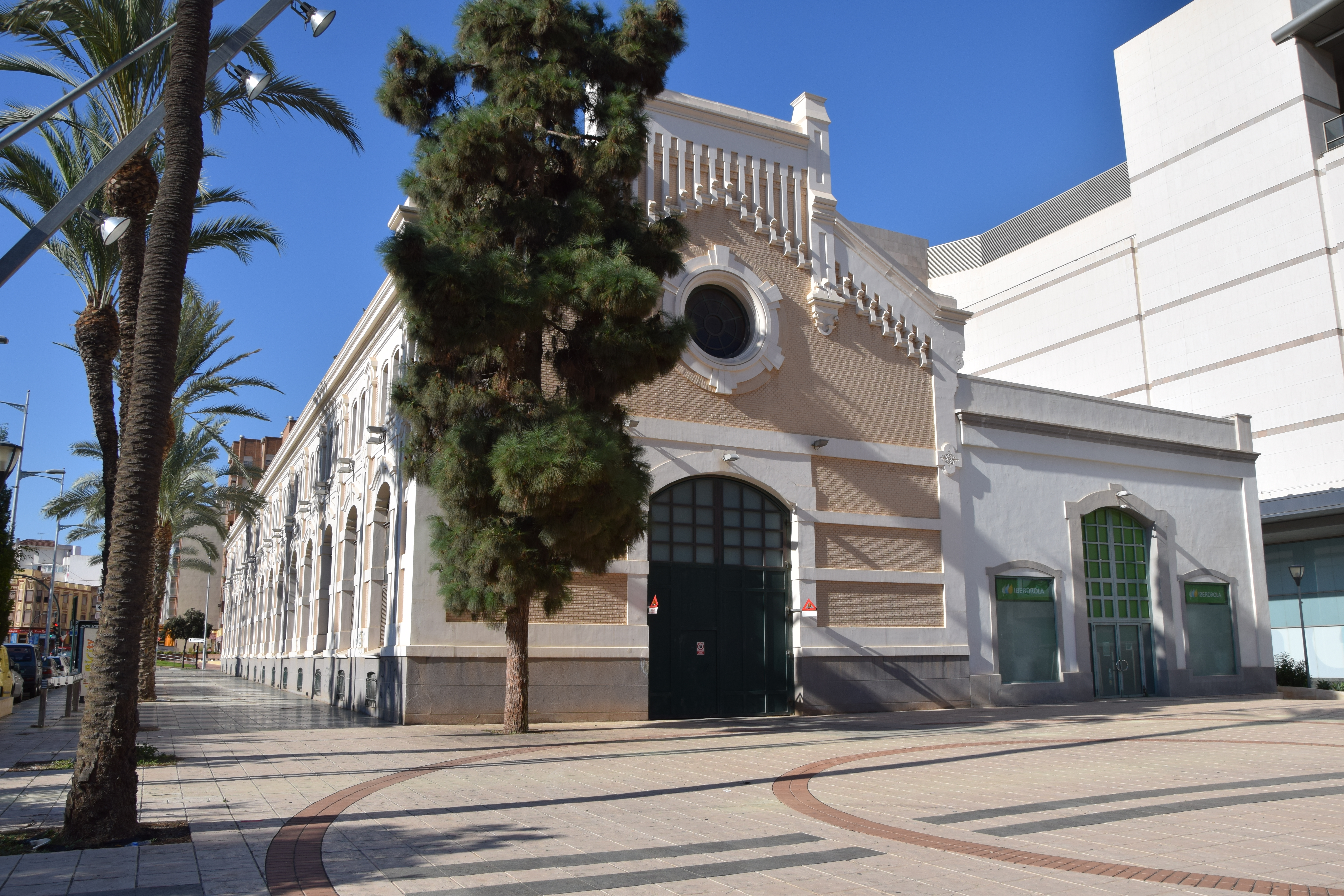 Fábrica de Fluido Eléctrico Hispania. Llamada desde siempre por los Cartageneros la fabrica de la luz situada en el ensanche de Cartagena con el tiempo paso a ser una estacion de transformacion electrica y ultimamente se construyo en parte del solar el Corte Ingles de Cartagena.